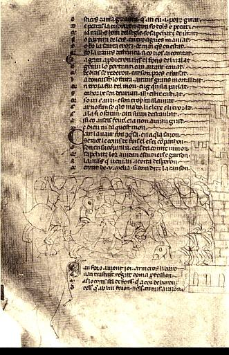 Le camp de Mont Joy (le combat de Montgey)